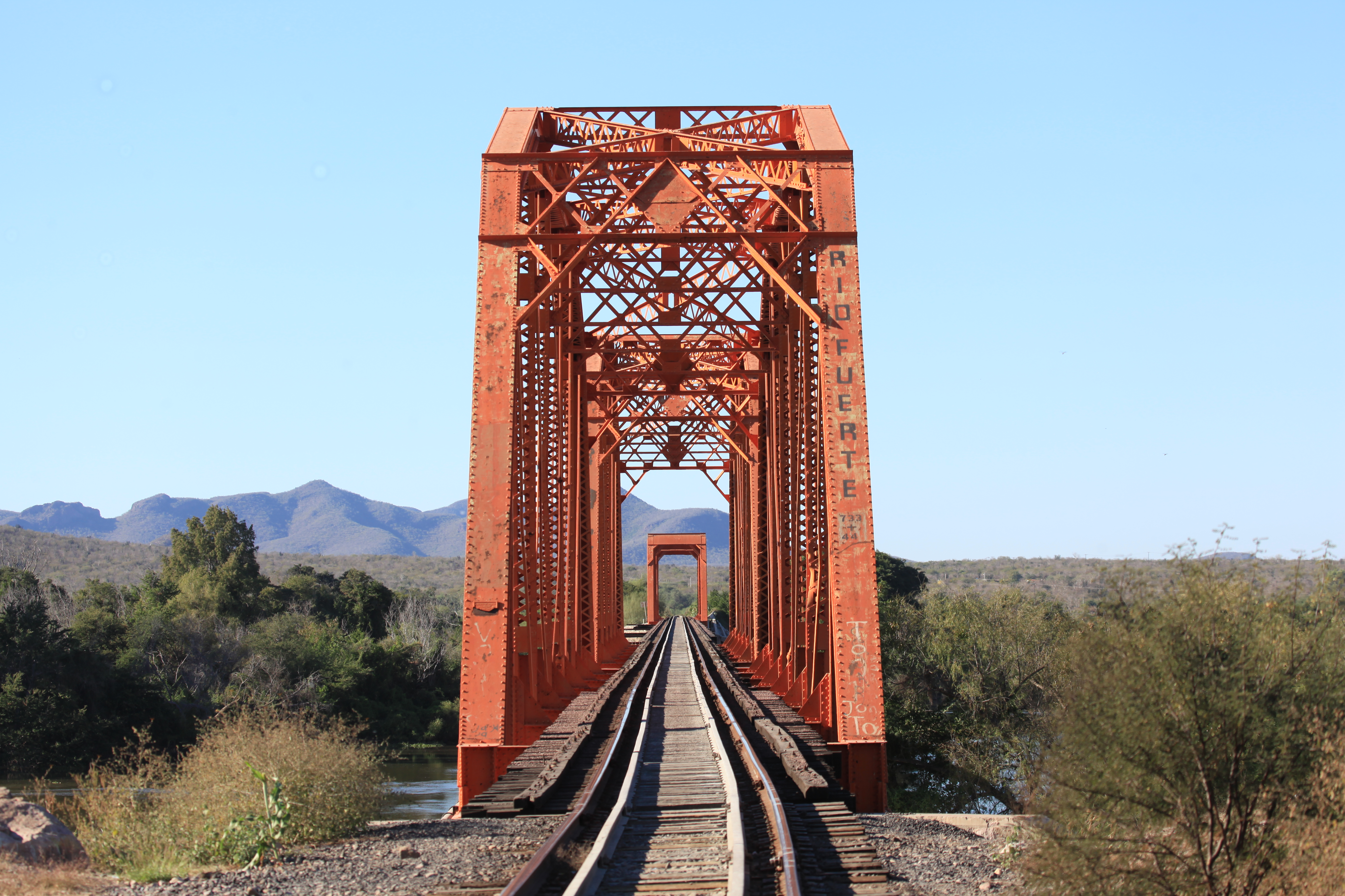 Puente Río Fuerte